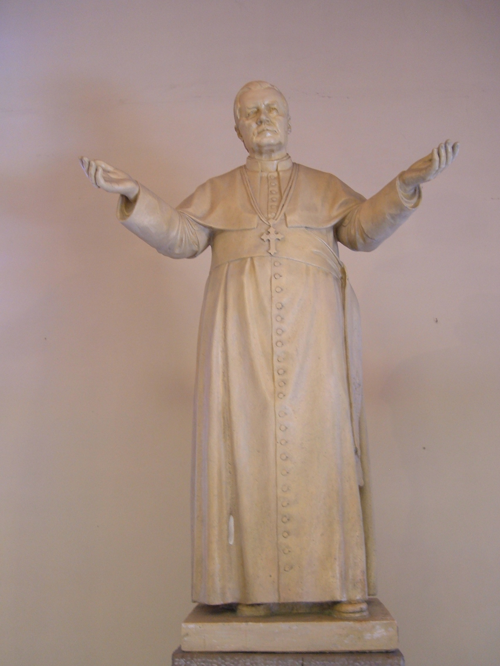 Chiesa di San Pio X (Rome): statua di san Pio X papa.